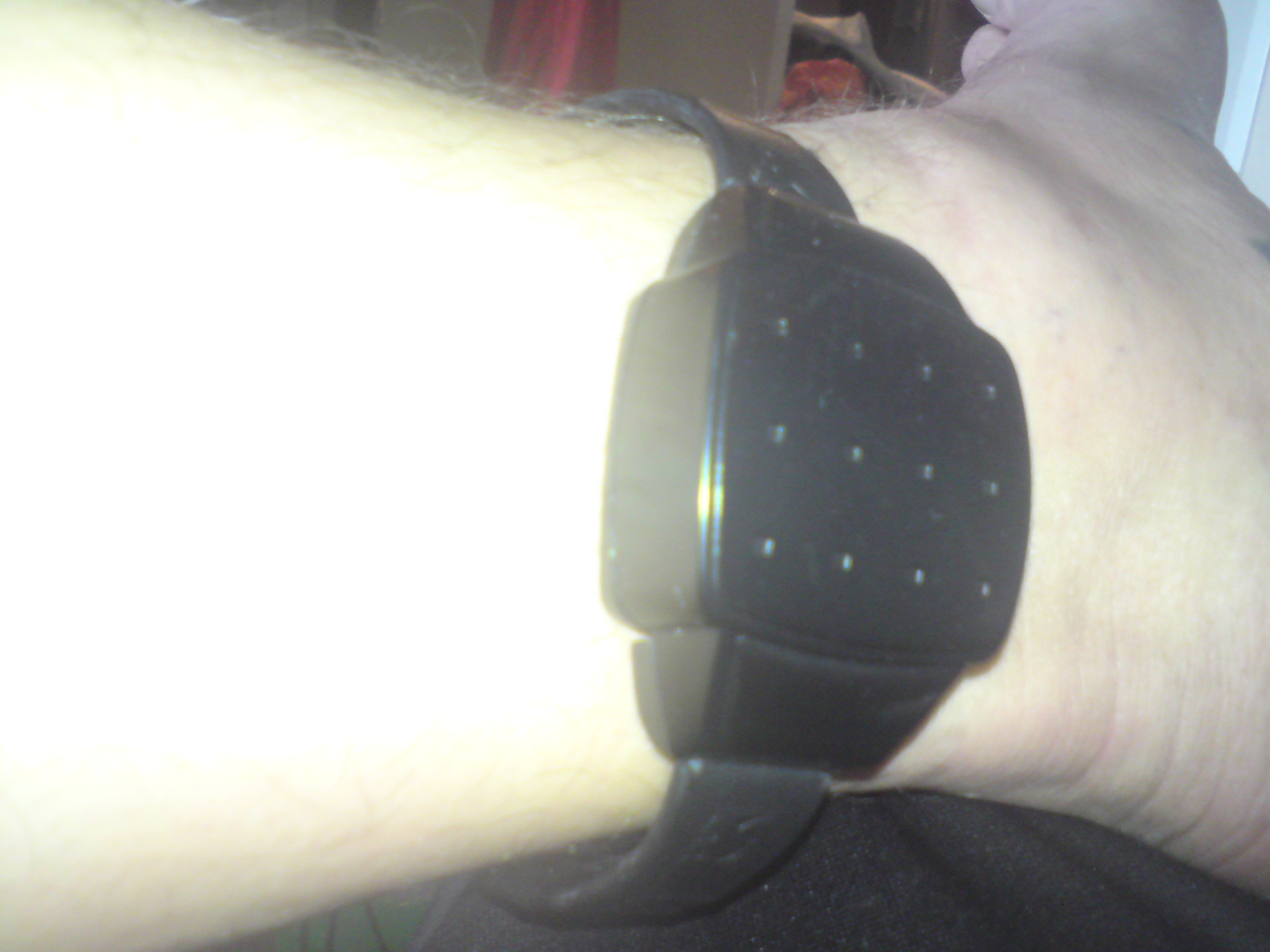 Dagens fotboja, "Intensivövervakning"